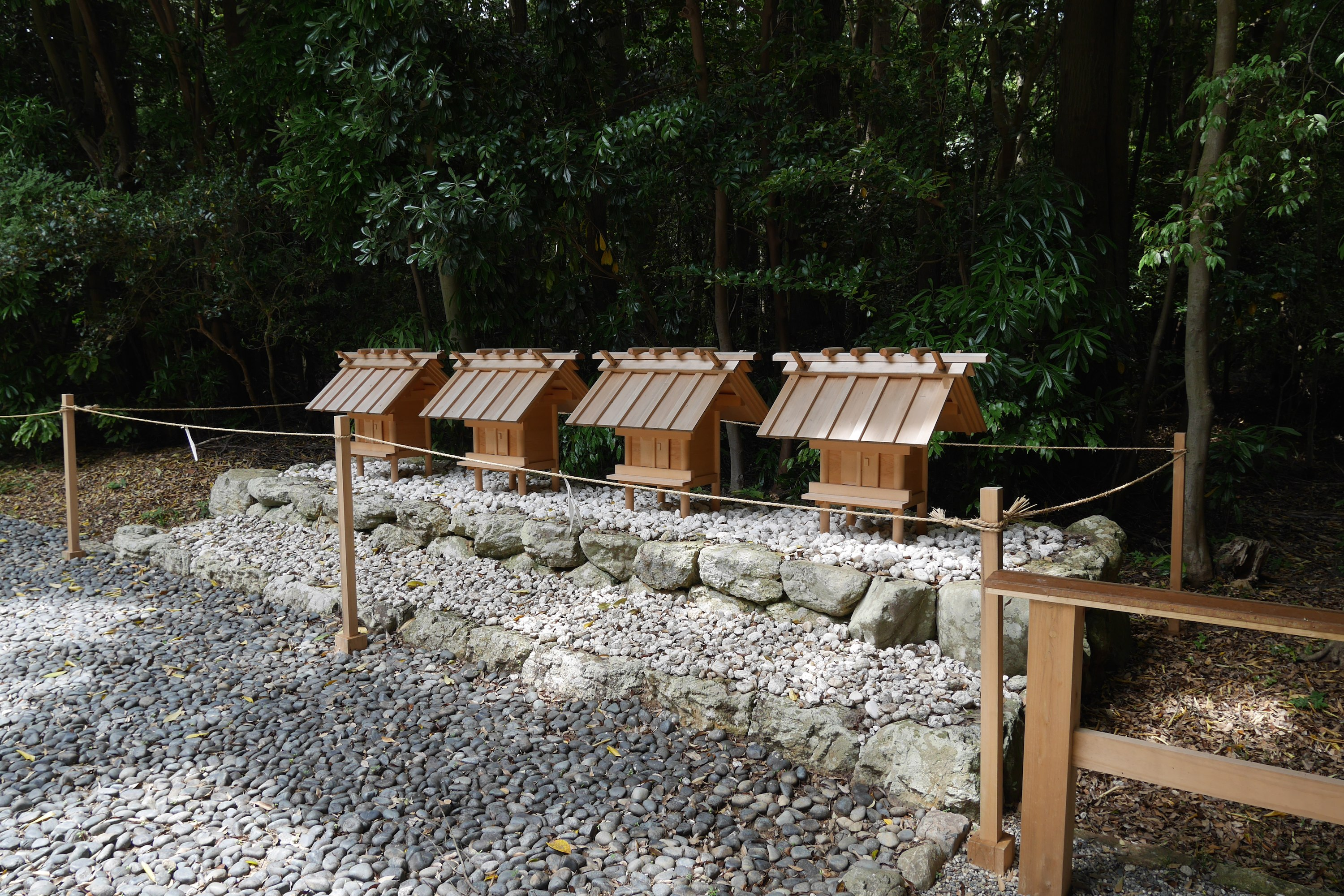 日本の三重県志摩市にある皇大神宮別宮伊雑宮所管社佐美長御前神社4社。